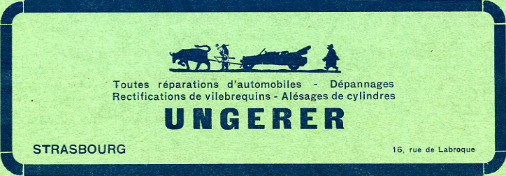 Publicité pour l'entreprise strasbourgeoise Ungerer (in La Vie en Alsace, juillet 1933, n° 7, 4e de couverture)